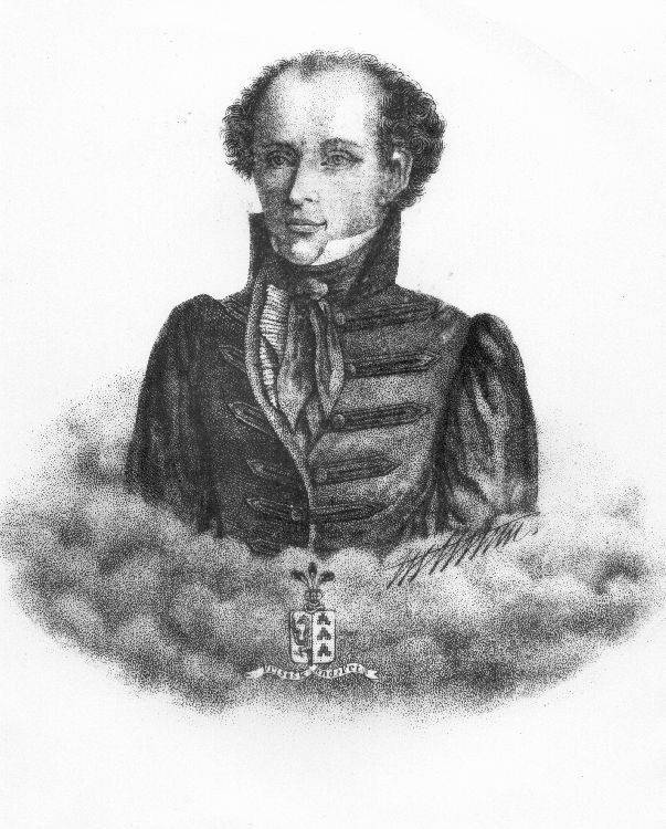 Montanus de Haan Hettema (1796-1873) um 1830: ‘Frisesk and Fri’. Anonyme Lithographie.